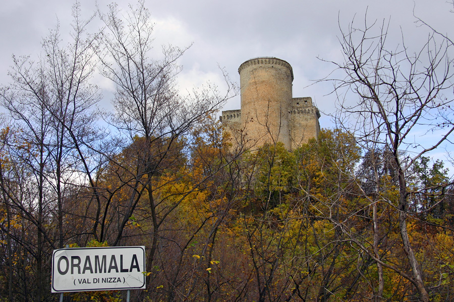 Scorcio del Castello di Oramala-Val di Nizza (PV) dei Malaspina